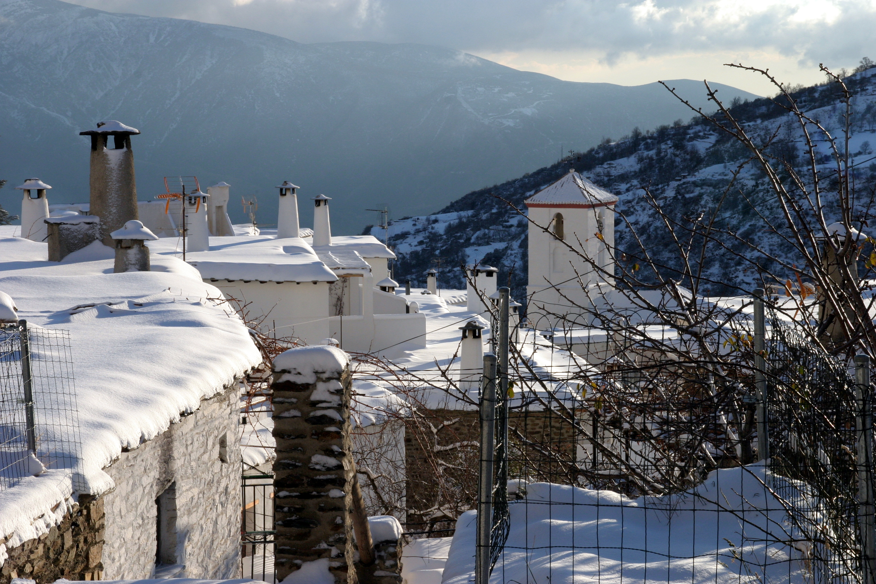 Capileira, en Granada (España)